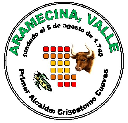 Creado a principios de 2,000 por la alcaldes Ruthbery Contreras